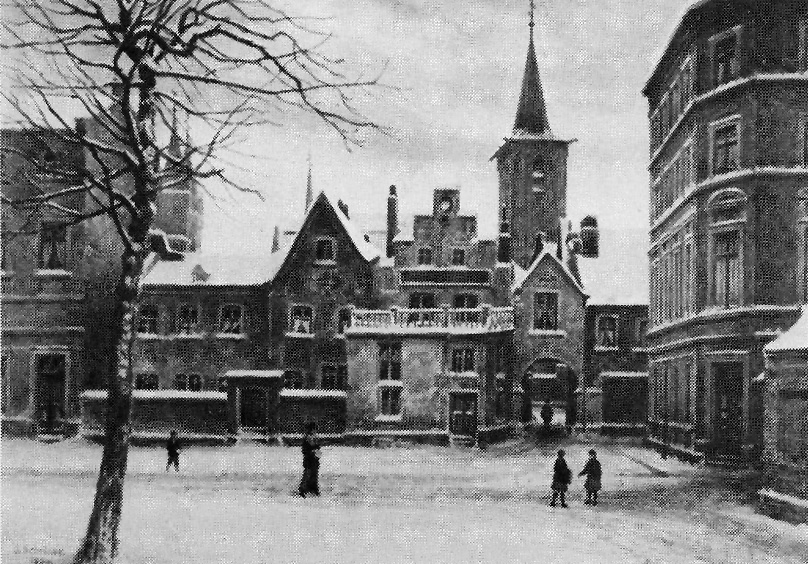 An der Eiche Köln. Blick auf St. Severin,Aquarell Jakob Scheiner (1821–1911)